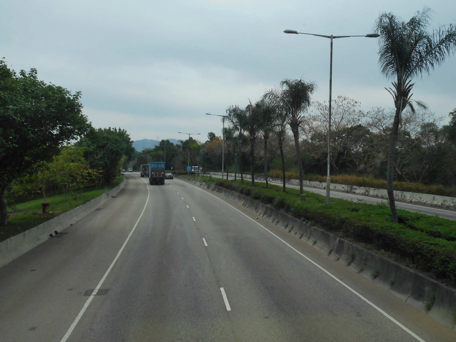 中文（香港）: 天影路近天水圍醫院的一段(2017年)